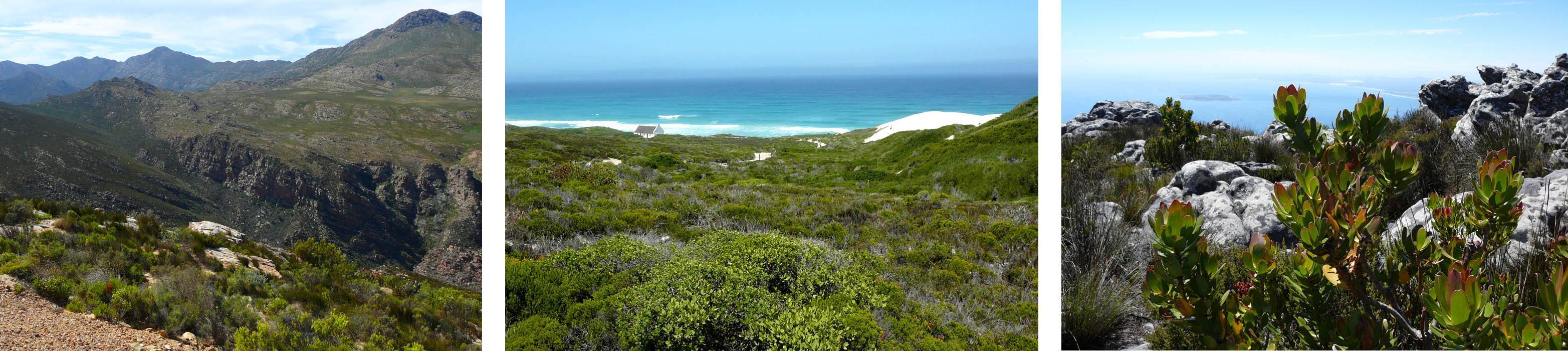 Cape Fynbos